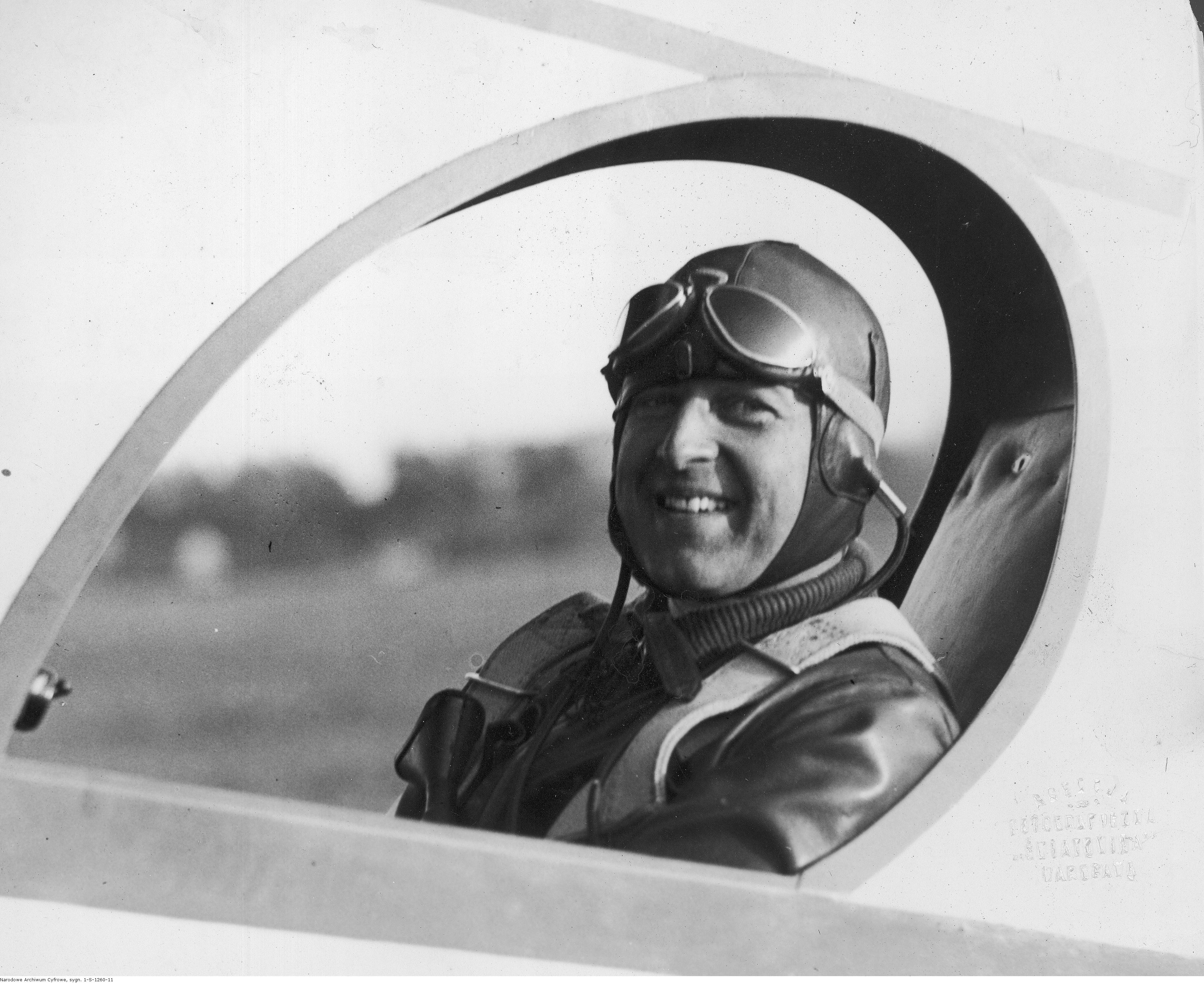 III Krajowy Konkurs Awionetek zorganizowany przez Zarząd Główny Ligi Obrony Powietrznej i Przeciwgazowej w 1930 r. Kapitan pilot Mateusz Iżycki w kabinie samolotu RWD-4. Koncern Ilustrowany Kurier Codzienny - Archiwum Ilustracji. Sygnatura: 1-S-1260-11